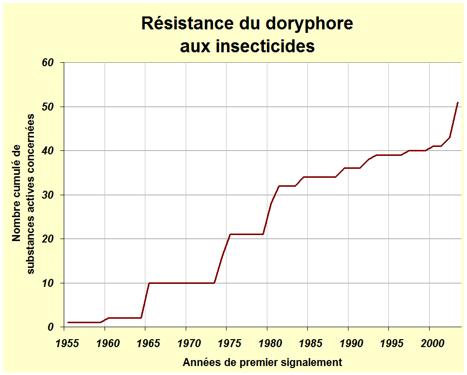 Graphique montrant le nombre cumulé de substances actives insecticides pour lesquelles des cas de résistance du doryphore (Leptinotarsa decmelineata Say) ont été signalés